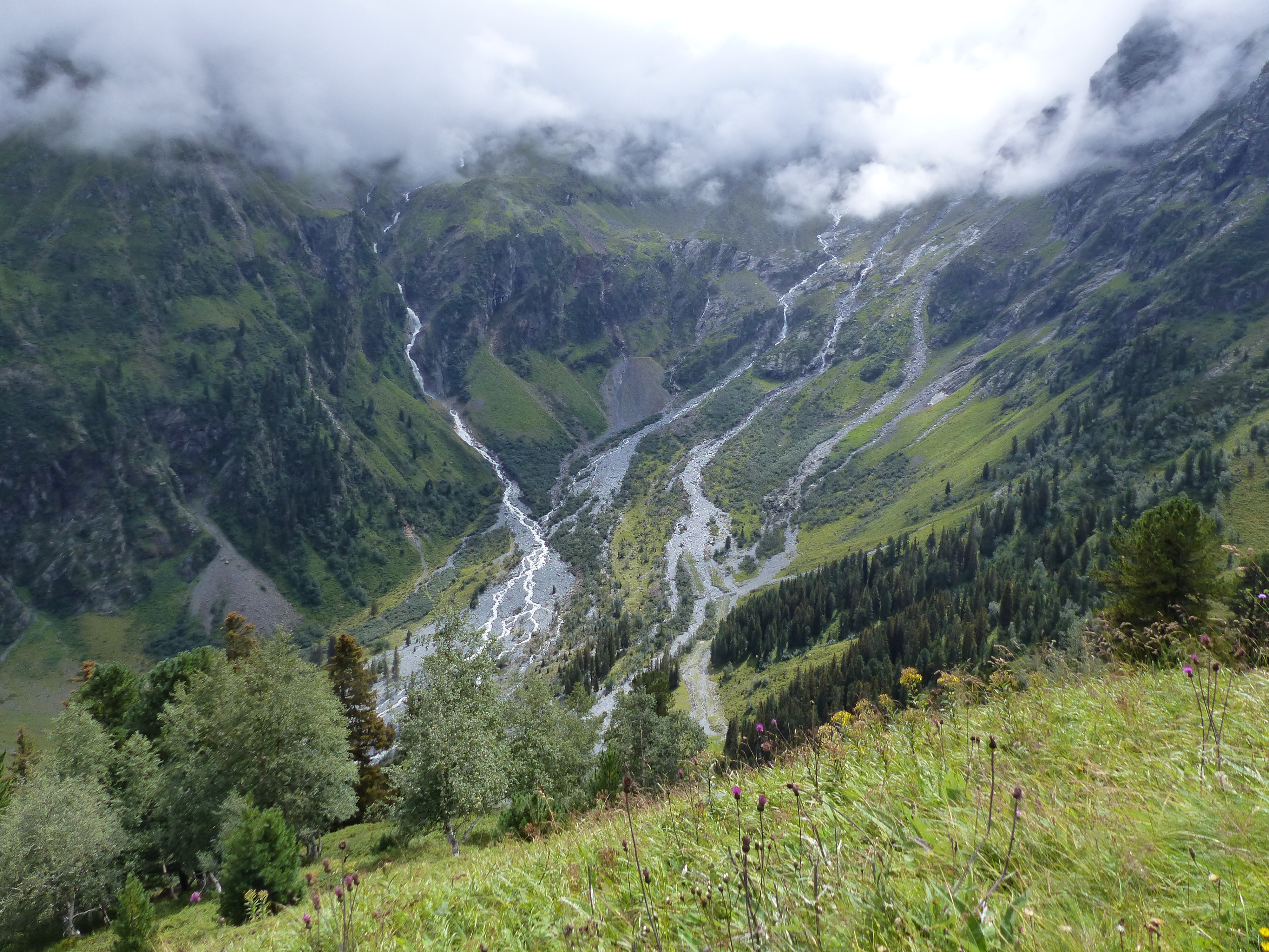 Talschluss des Lüsenstales